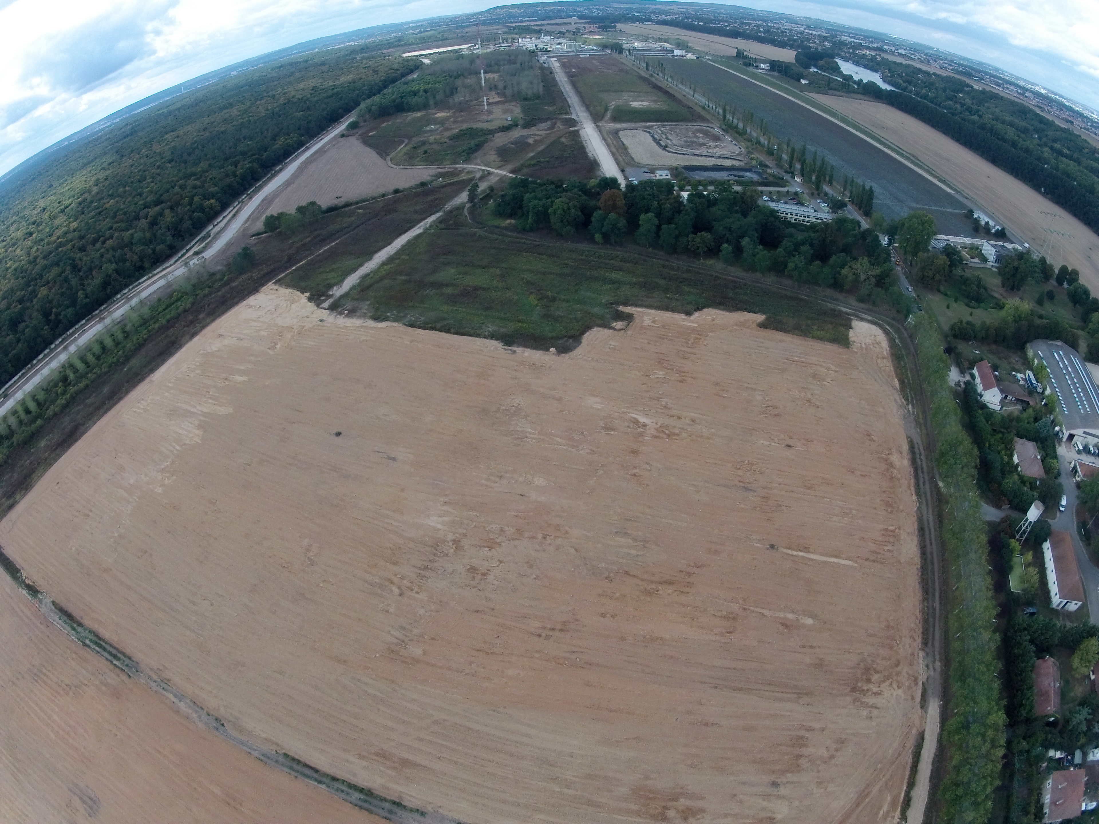 Après recouvrement des restes du fort Saint-Sébastien, ancien camp d'entrainement des armées de Louis XIV, au nord de la forêt de Saint-Germain